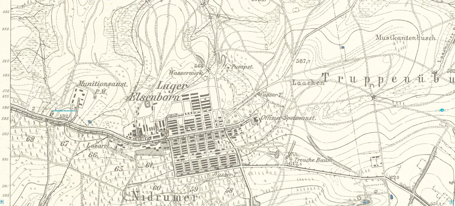 Meßtischblatt 3207 : Elsenborn, 1910 (Sächsische Landesbibliothek - Staats- und Universitätsbibliothek Dresden (SLUB)) Aufnahme-Nr.: df_dk_0010001_5503_1894a Datensatz-Nr.: obj 71056461